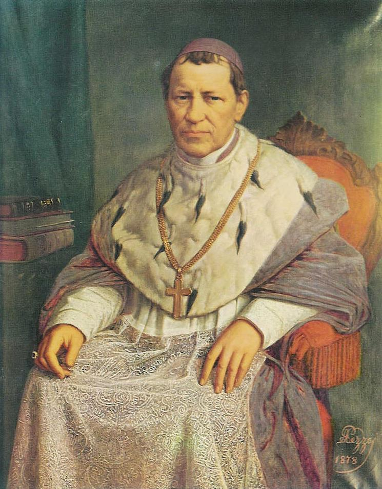 Portrait des Fürstbischofs Vinzenz Gasser